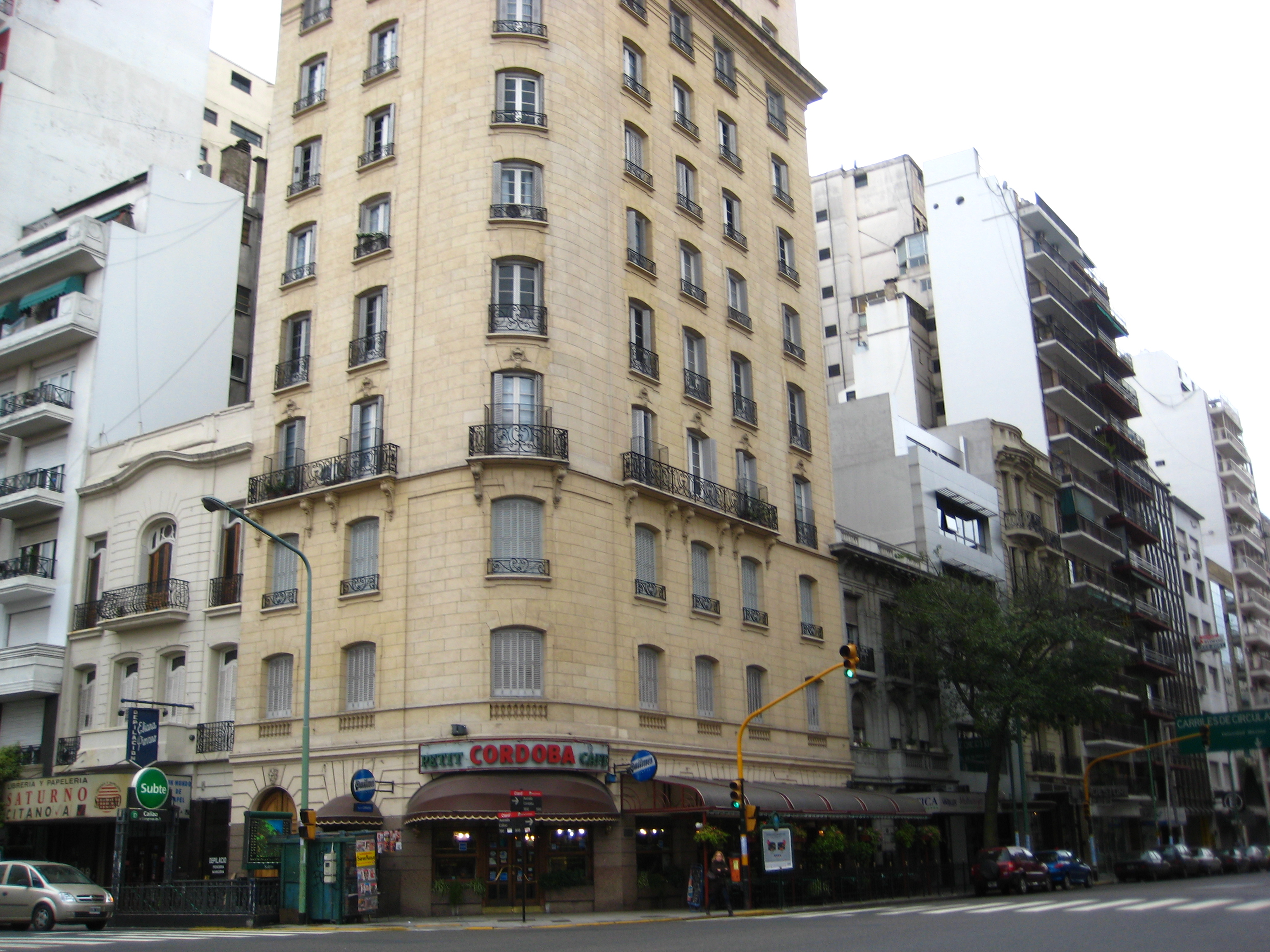 Esquina de Córdoba y Callao, barrio de Balvanera, Buenos Aires, Argentina.